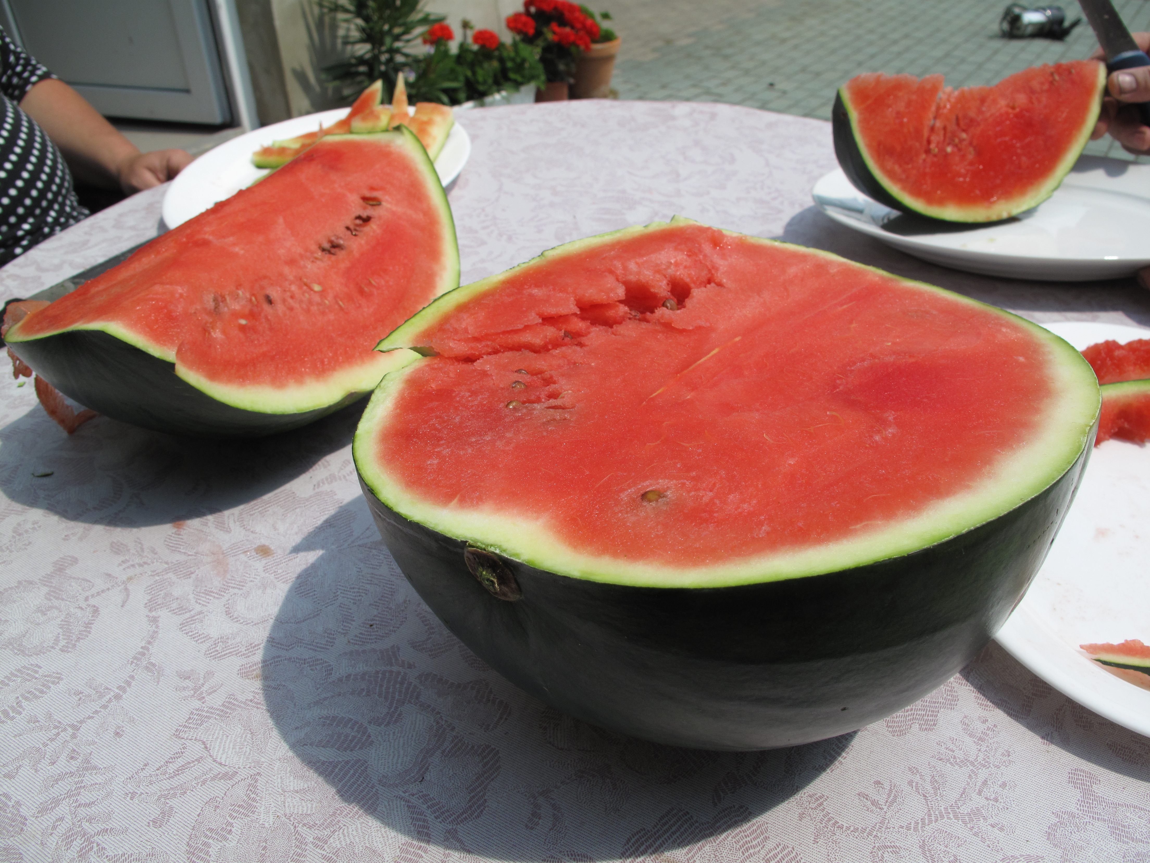 Rozkrojený meloun